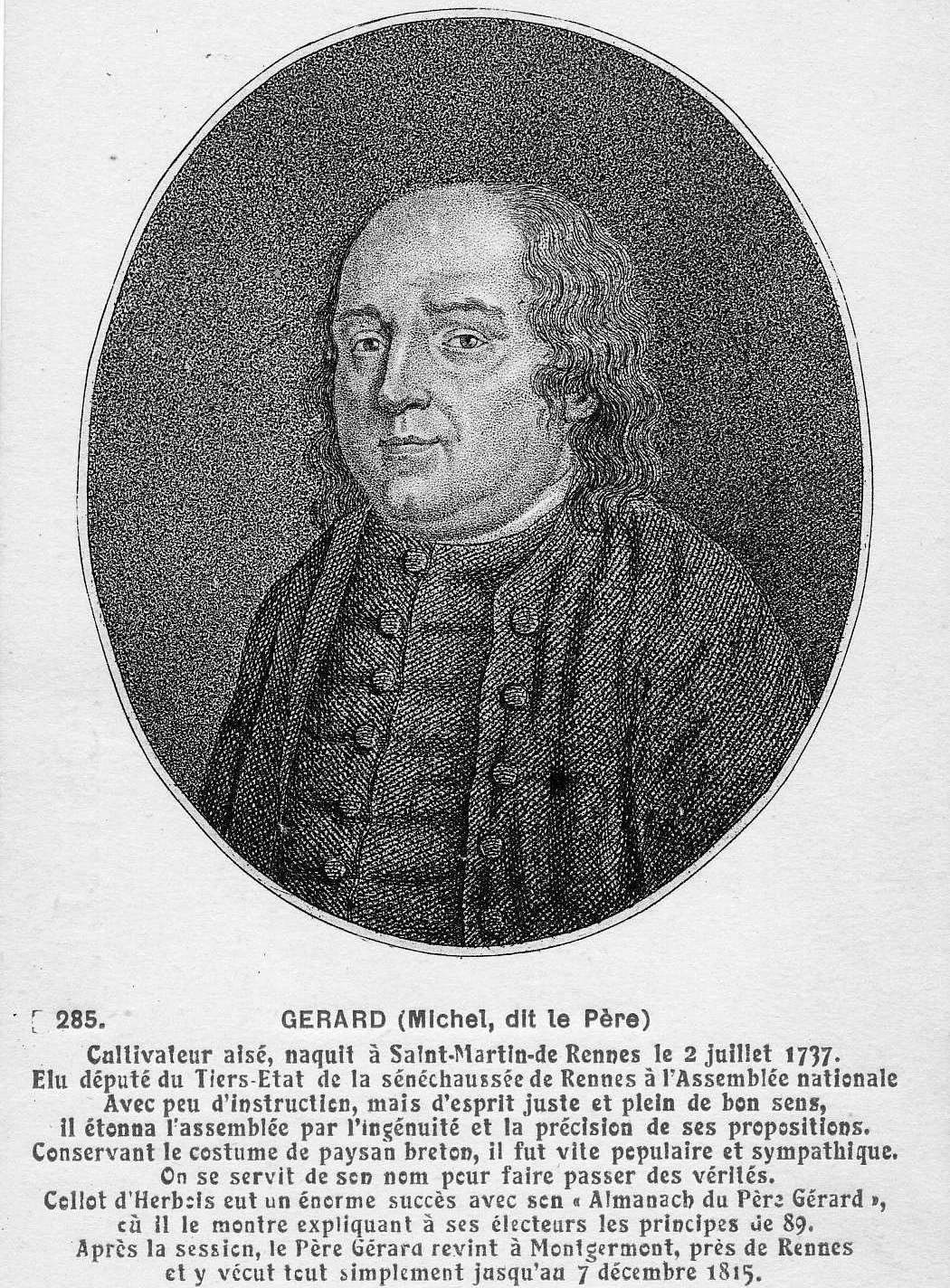 Portrait de Michel Gérard, dit Père Gérard (1760-1838), député du tiers-état. Carte postale F. Château, conservée aux Archives de Rennes, 100 Fi 457